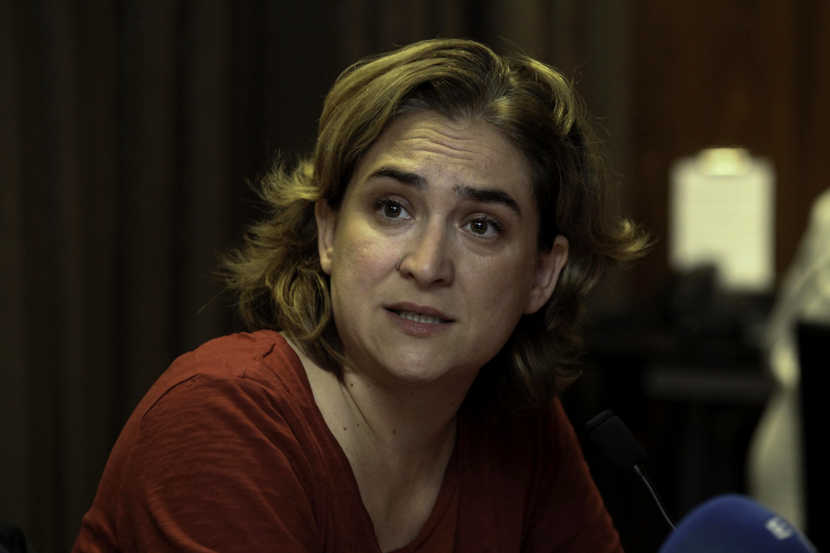 Barcelona (España), 04 de noviembre 2013. El Canciller Ricardo Patiño ofreció una rueda de prensa junto a Ada Colau, activista social y una de las fundadoras de la Plataforma de Afectados por la Hipoteca. Foto: Fernanda LeMarie - Cancillería del Ecuador.